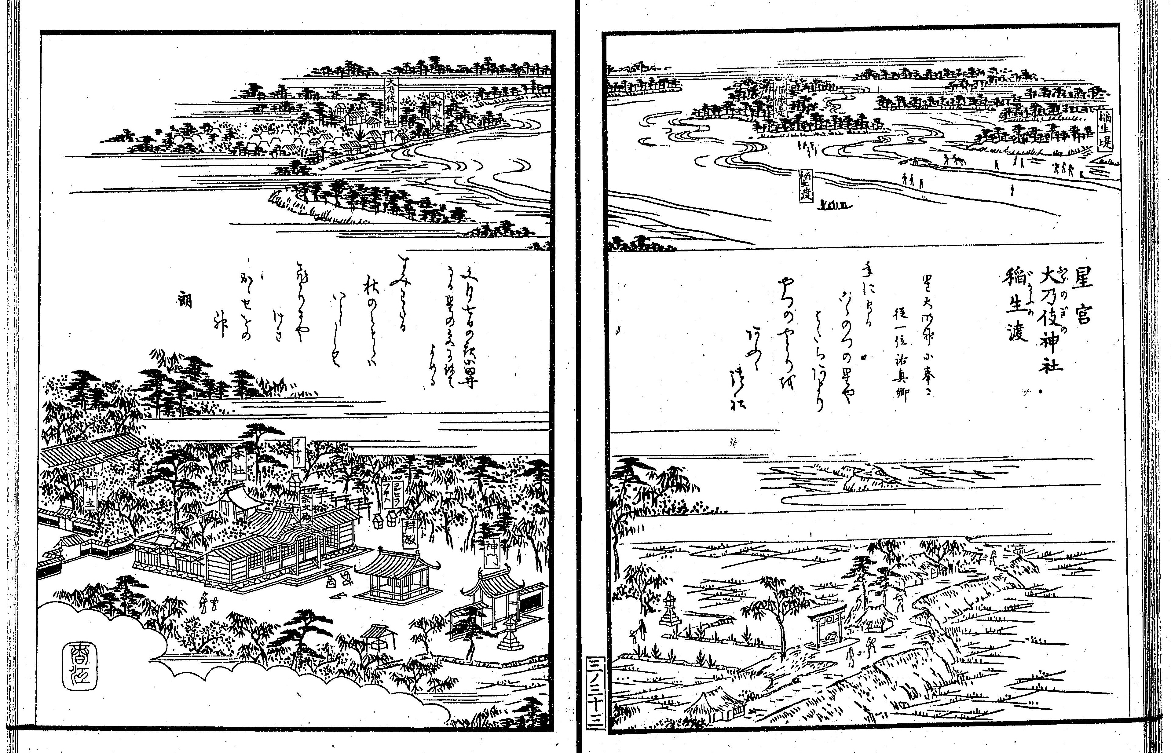 尾張名所図会後編巻3より 星宮 大乃伎神社 稲生渡